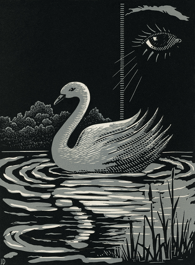 Jaroslav Dobrovolský: Labutinka – ilustrace z knihy Petr Bezruč 1937, 1937, barevný dřevoryt